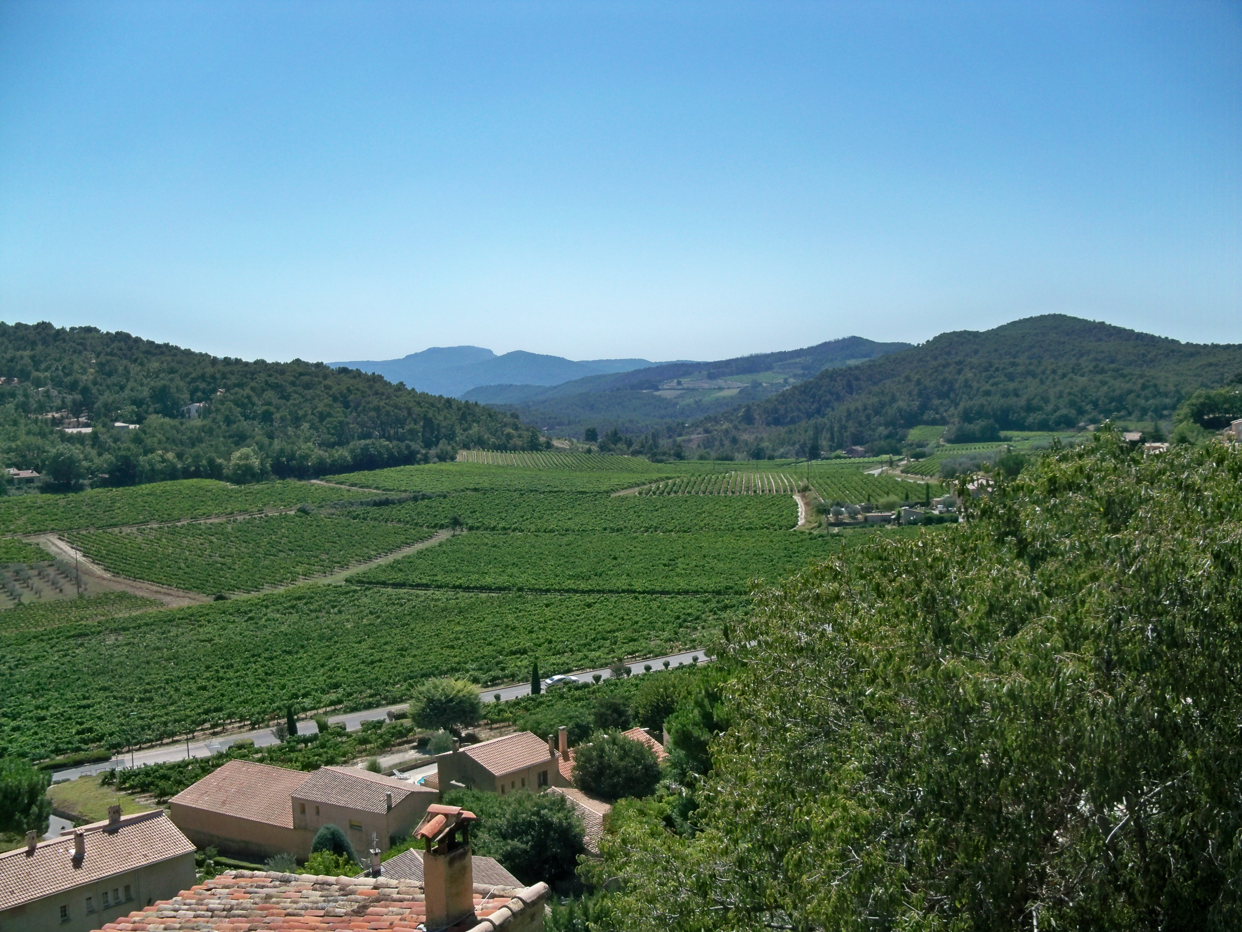 Vignoble à Faucon, Vaucluse, France